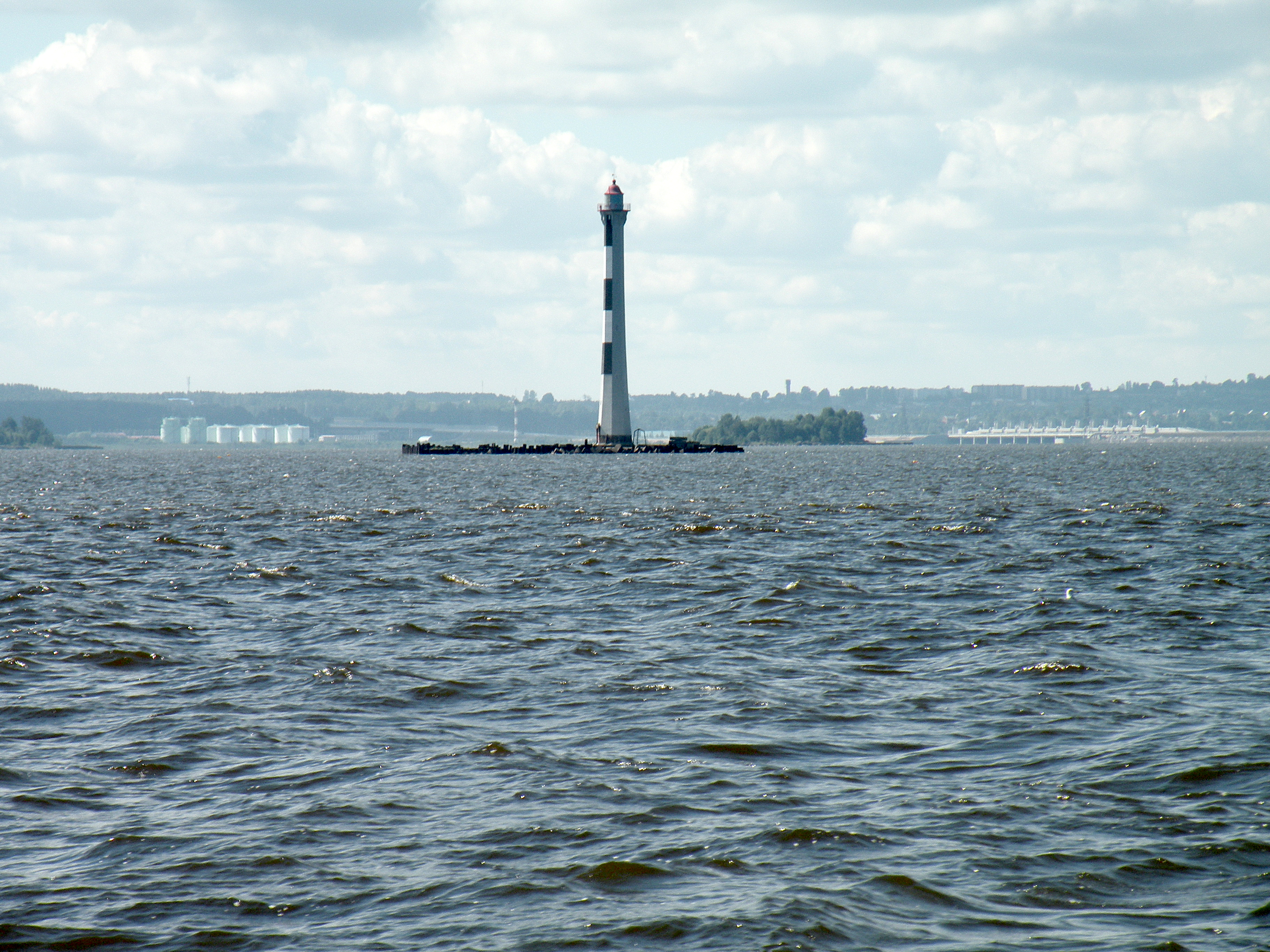 Задний створный знак Санкт-Петербургского морского канала и форт Дзичканец